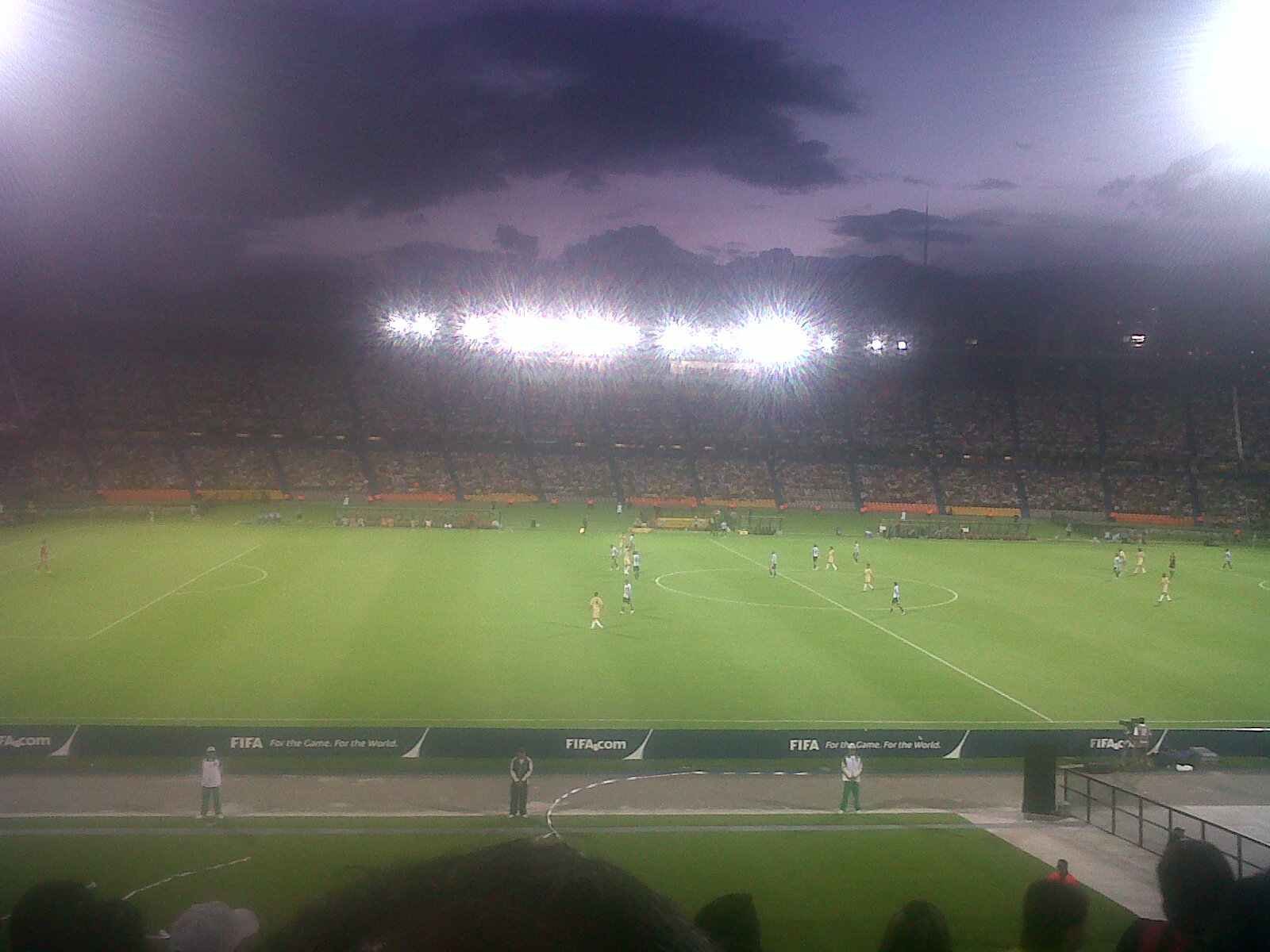 El estadio Atanasio Girardot en la Copa Mundial de la FIFA sub 20. octavos de final Argentina vs Egipto